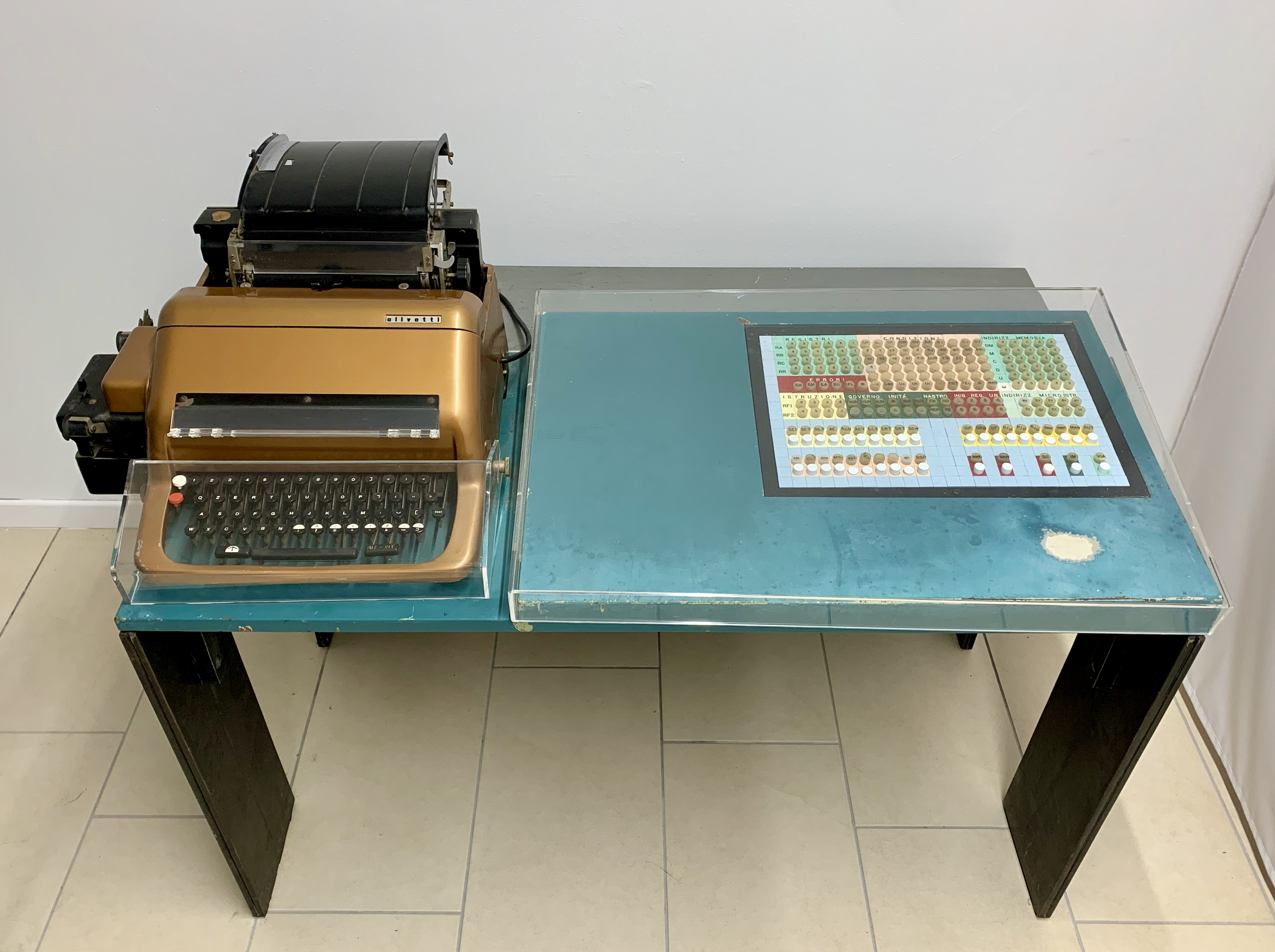 Olivetti Elea 6001 del Museo degli strumenti per il calcolo di Pisa ed esposto nella mostra Hello World! (2019-2020).